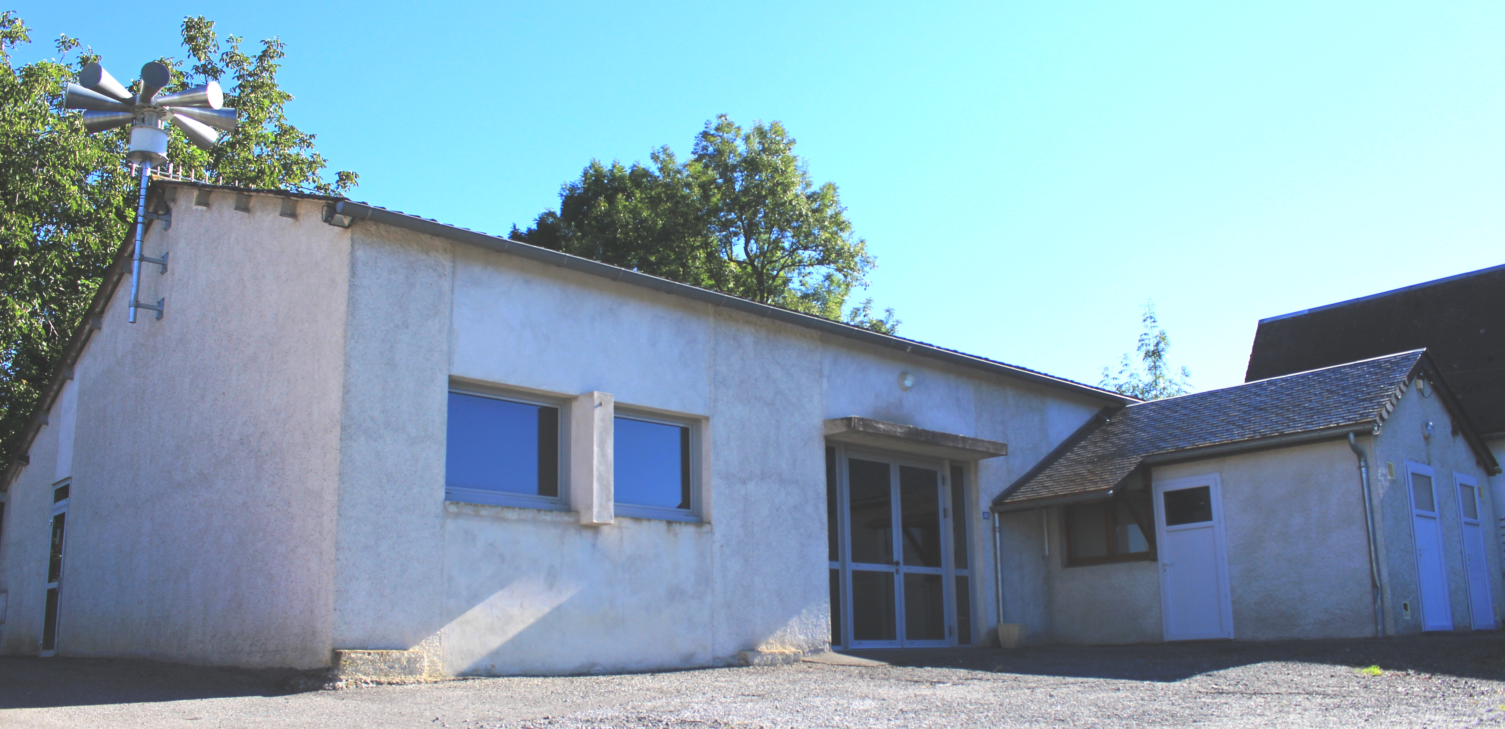 Salle des fêtes de Bonnemazon (Hautes-Pyrénées)